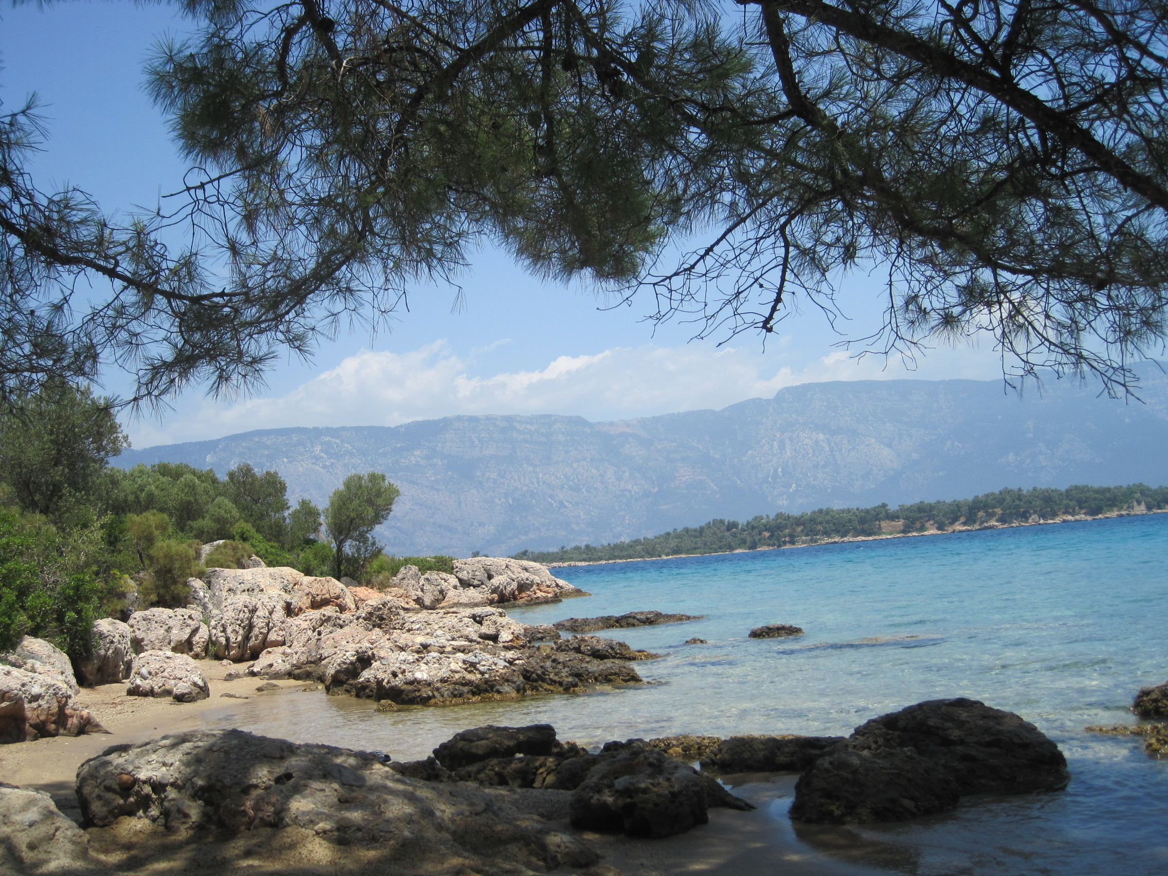 48700 Karaca/Marmaris/Muğla, Turkey